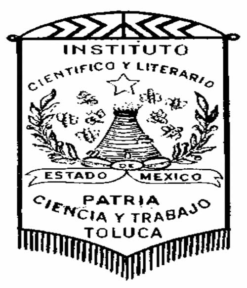 El estandarte del Instituto Científico y Literario diseño original